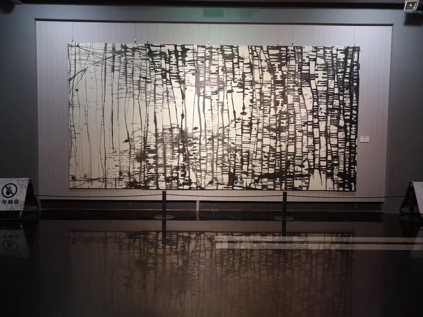 grand tableau 496 x 220 cm exposé dans le Musée du Fujian